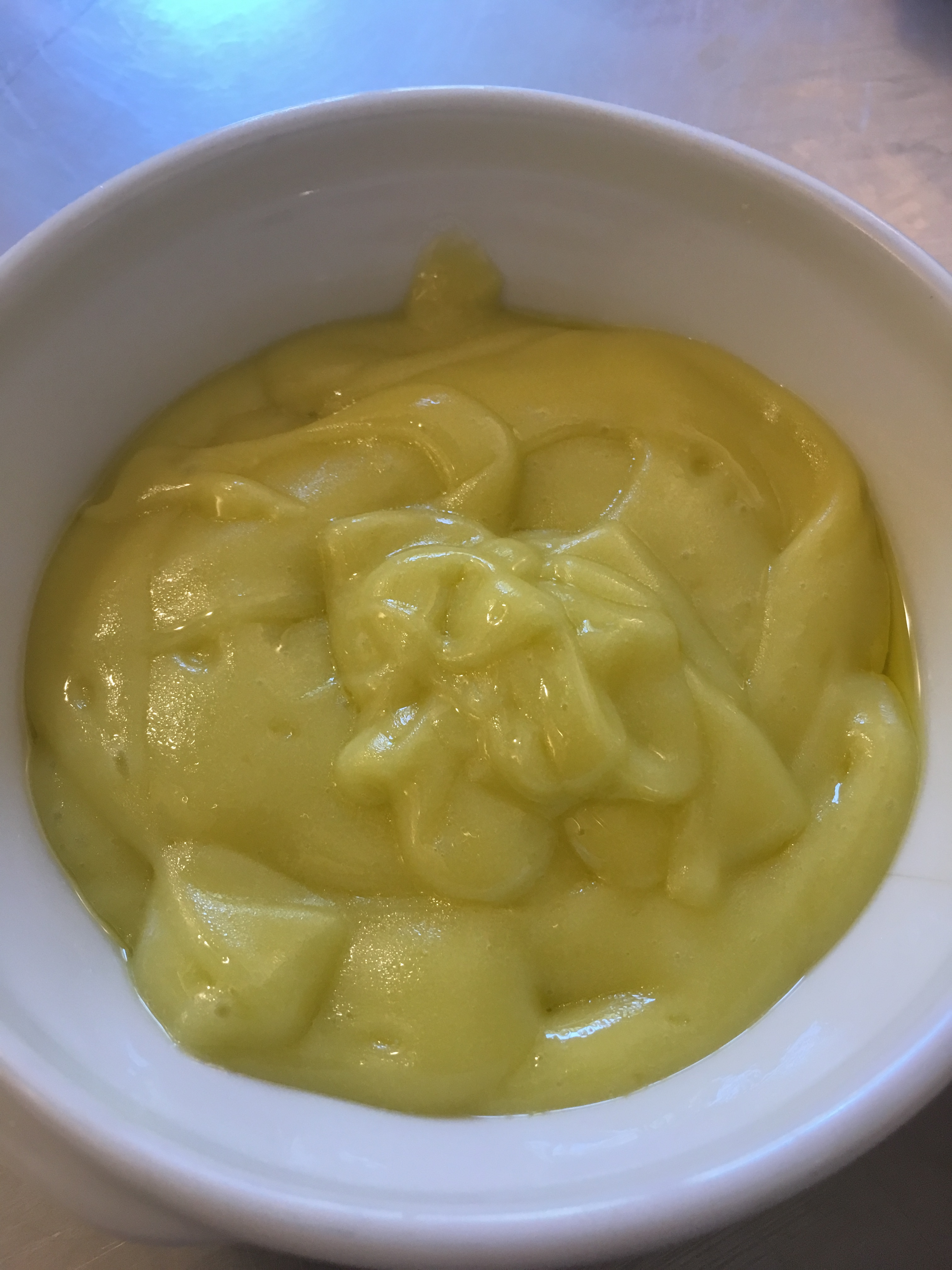 Mayonesa de aceite